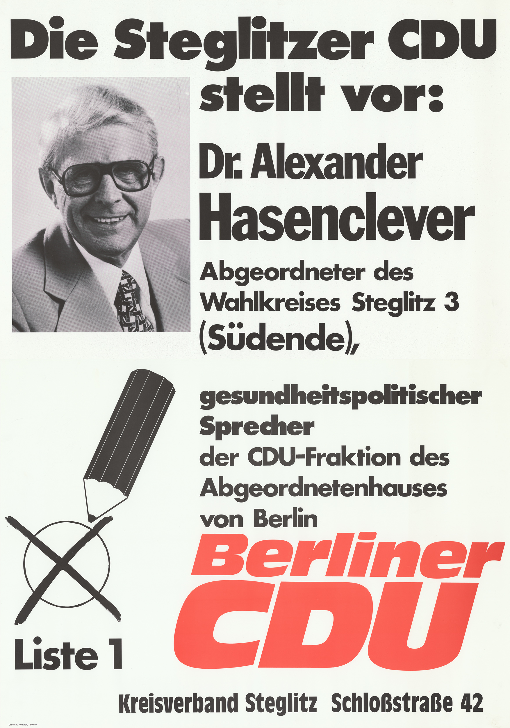 Die Steglitzer CDU stellt vor: Dr. Alexander Hasenclever ... gesundheitspolitischer Sprecher der CDU-Fraktion des Abgeordnetenhauses von Berlin Liste 1 Berliner CDU Kreisverband Steglitz ... Abbildung: Porträtfoto - Bleistift mit Stimmkreuz Kommentar: Zweiteiliges Plakat Plakatart: Kandidaten-/Personenplakat mit Porträt Auftraggeber: KV Steglitz Drucker_Druckart_Druckort: A. Hentrich, Berlin-Steglitz Objekt-Signatur: 10-004 : 535 Bestand: Plakate zu Abgeordnetenhauswahlen Berlin (10-004) GliederungBestand10-18: Plakate zu Abgeordnetenhauswahlen Berlin (10-004) » CDU Lizenz: KAS/ACDP 10-004 : 535 CC-BY-SA 3.0 DE